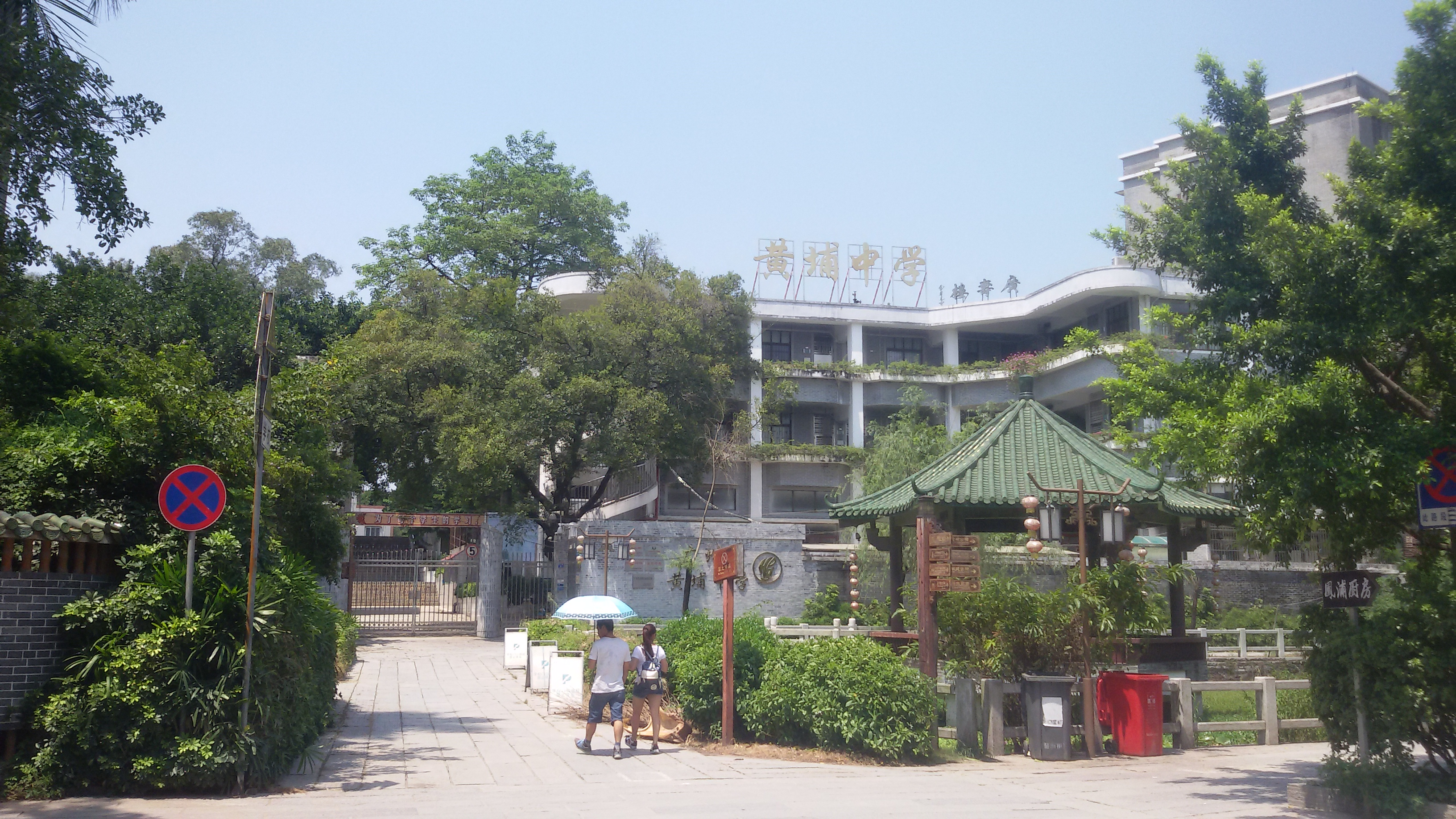 粵語: 海珠區黃埔中學嘅正門